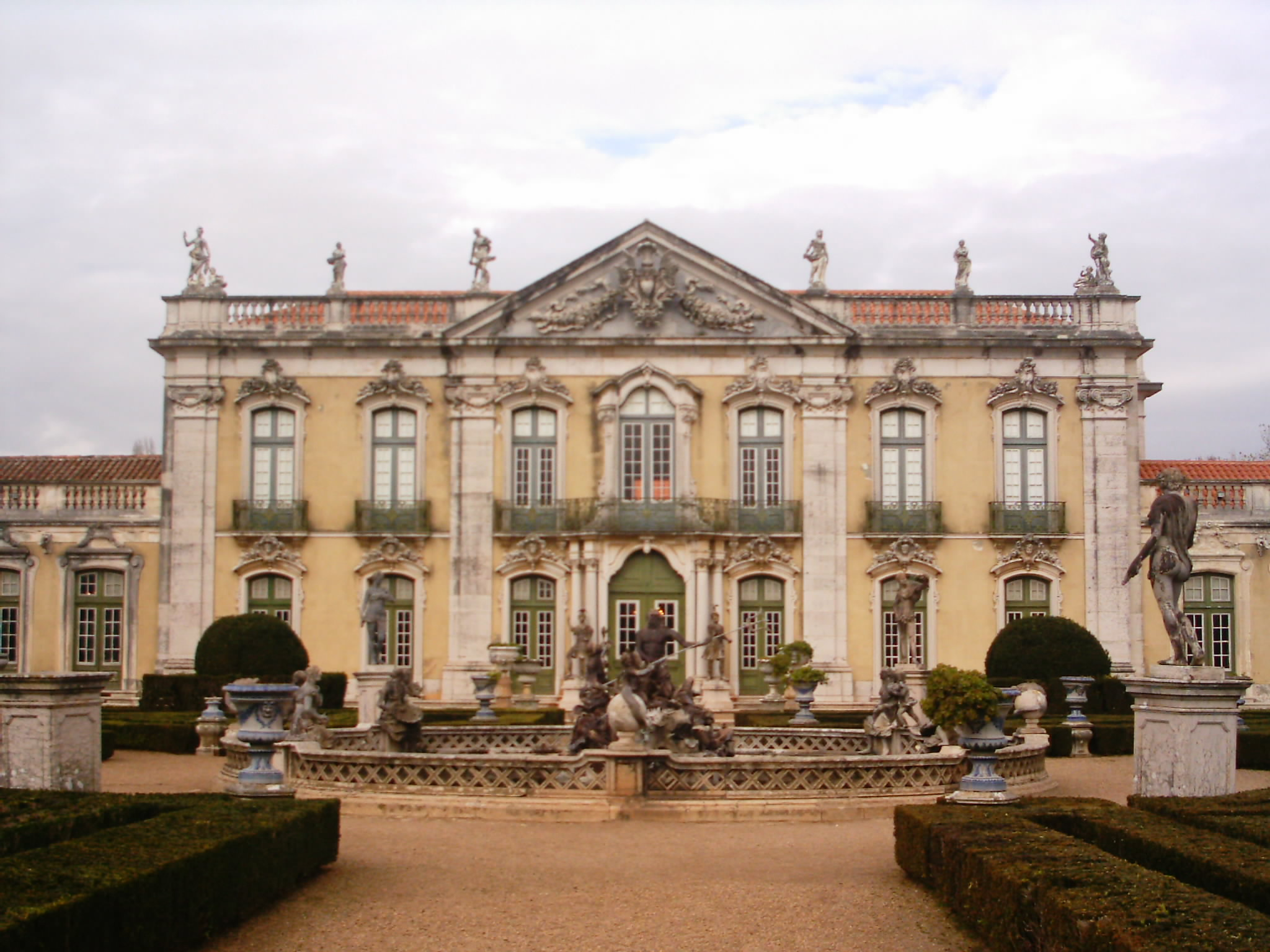 Palácio de Queluz, Portugal. Vista dos jardins do palácio para as fachadas.